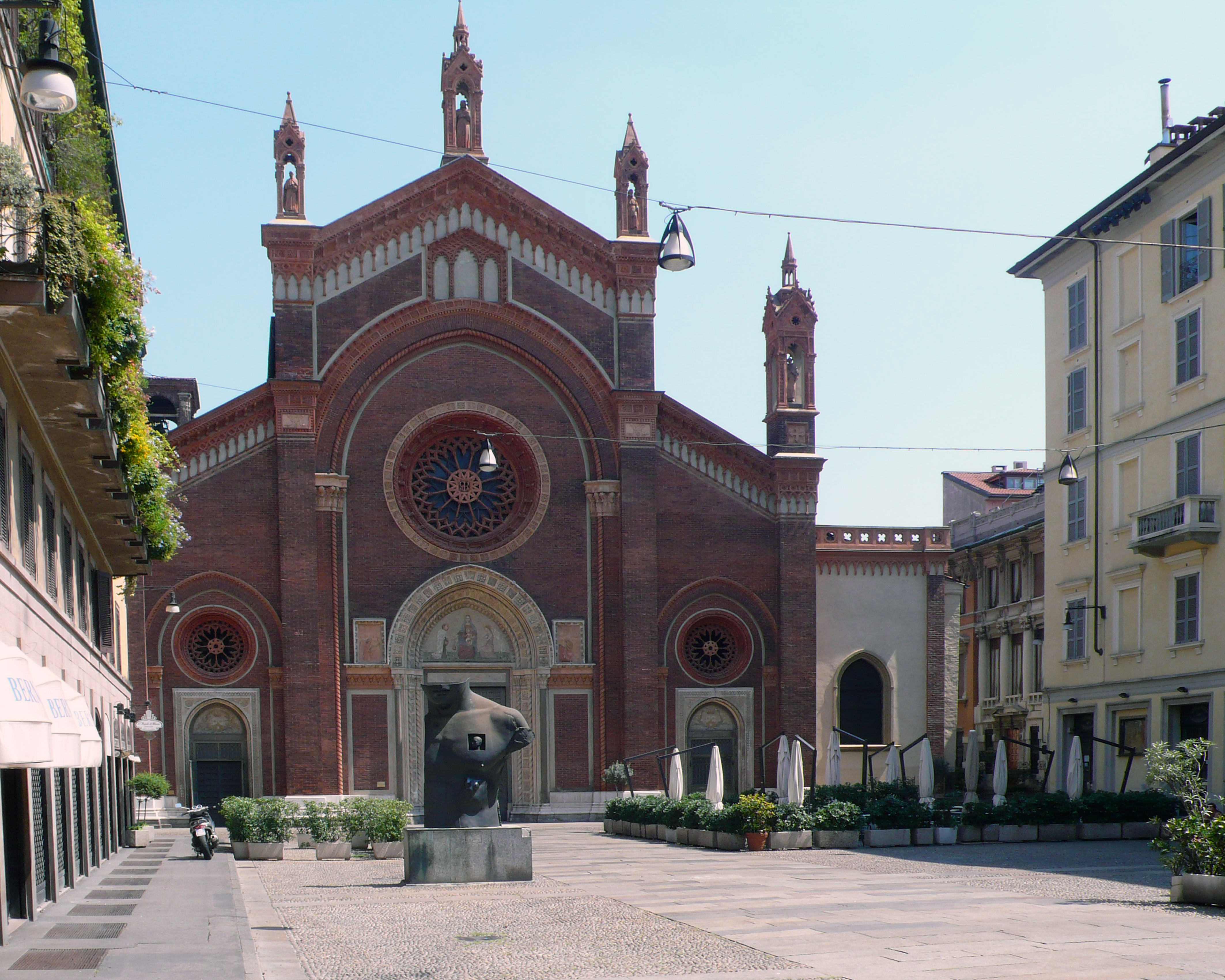 Santa Maria del Carmine in Milan - Facade